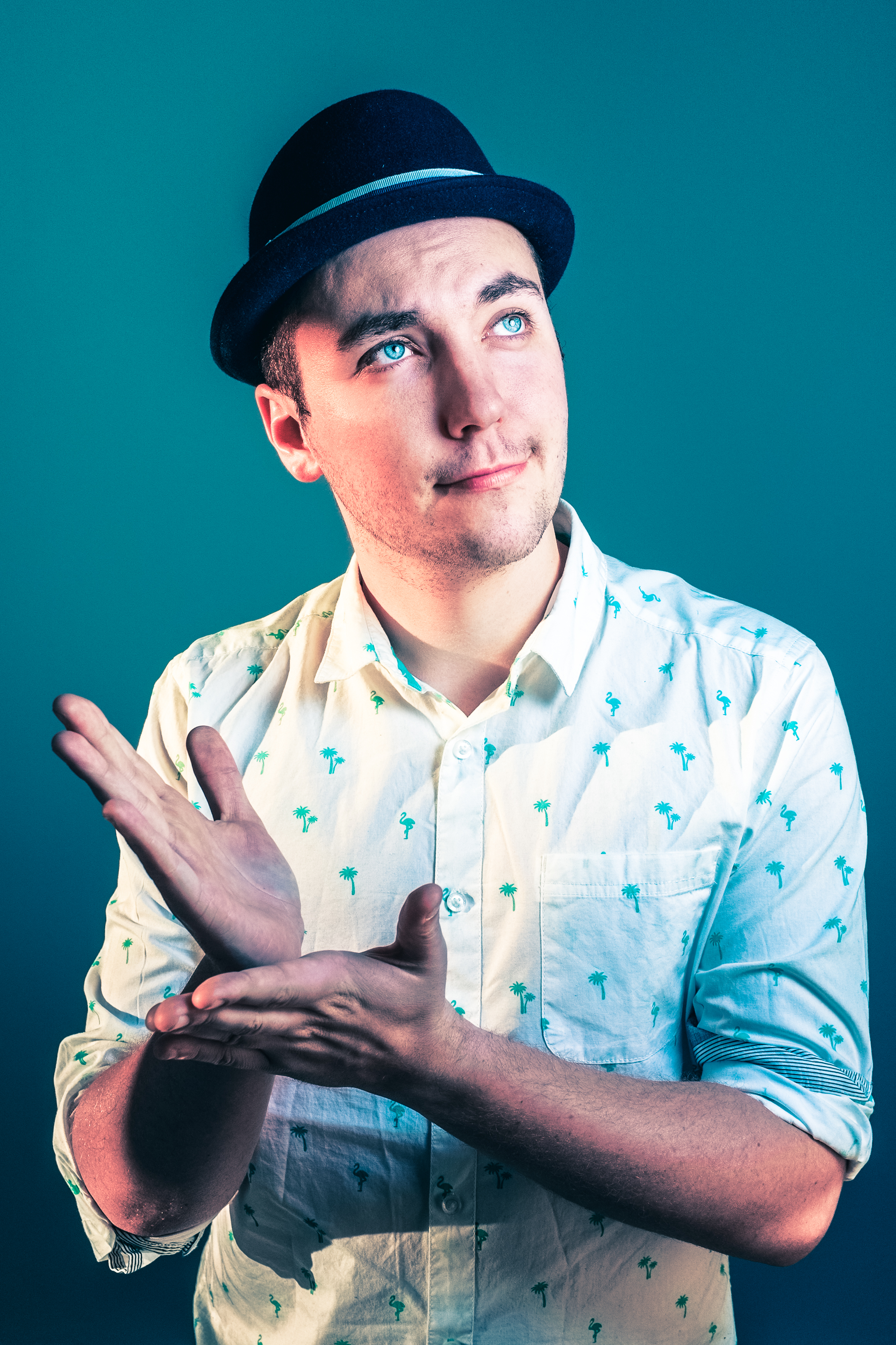 Simon Goodlife - Pressefoto (C) Janko Rašeta